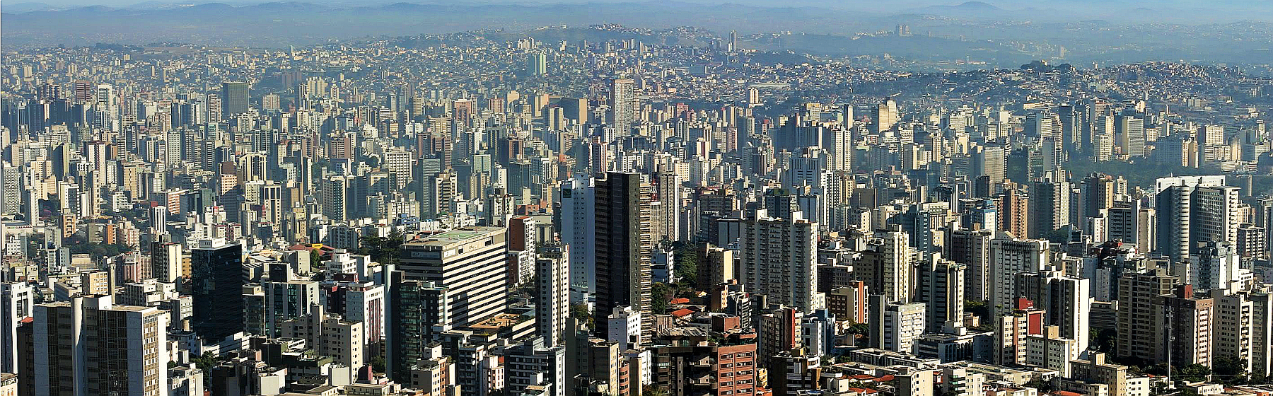 Vista de Belo Horizonte a partir do mirante do Mangabeiras